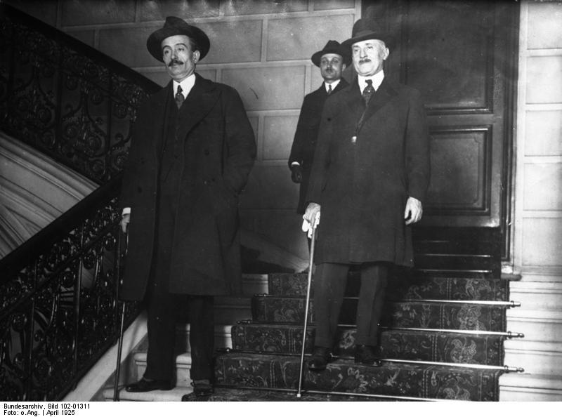 Frankreich. Callaux, der neue französische Finanzminister links verlässst mit Maloi nach einer Besprechung bei Painleve das Elysee.